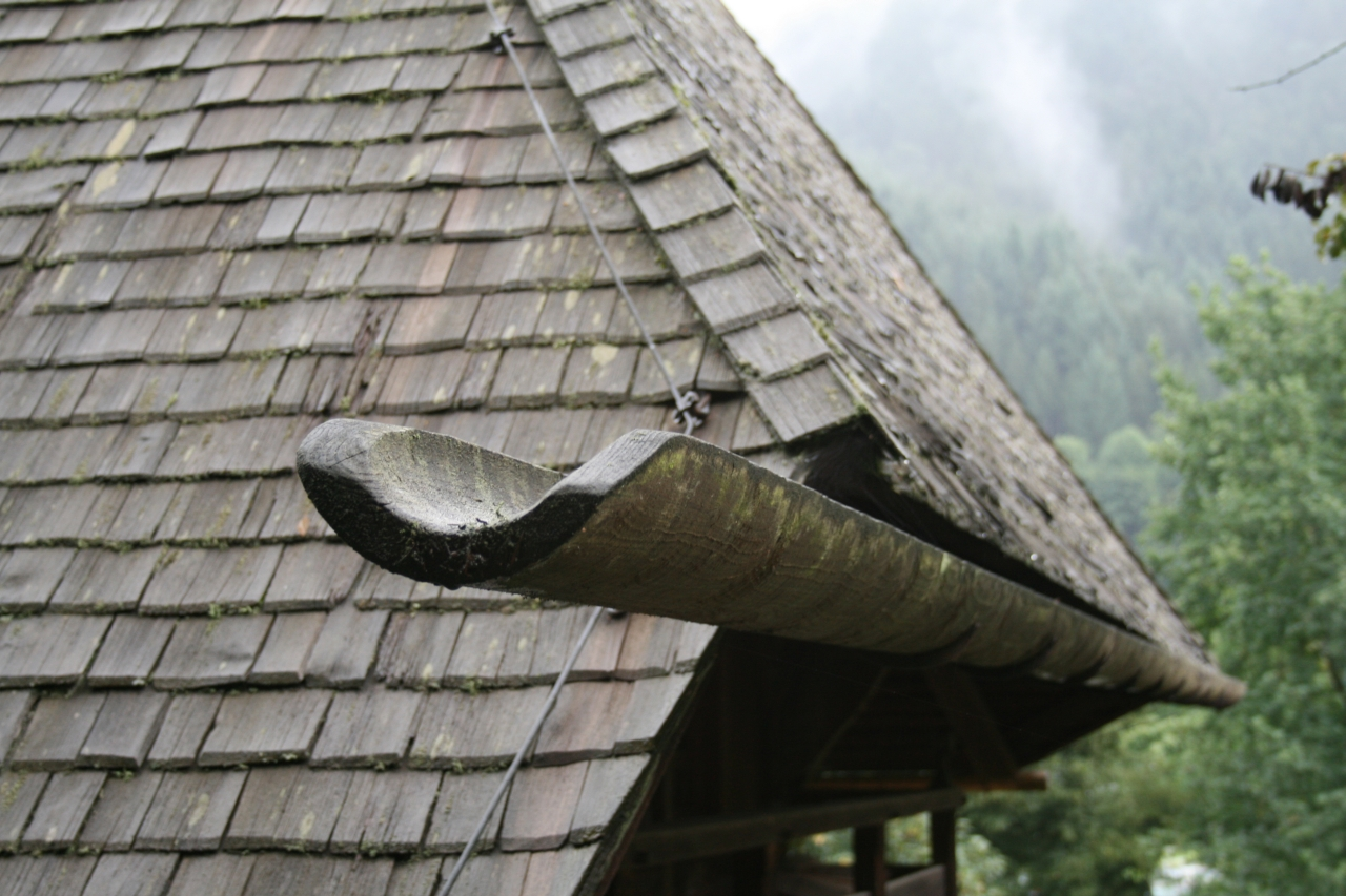 Dach eines Schwarzwaldhauses mit Holzschindeln und hölzerner Regenrinne